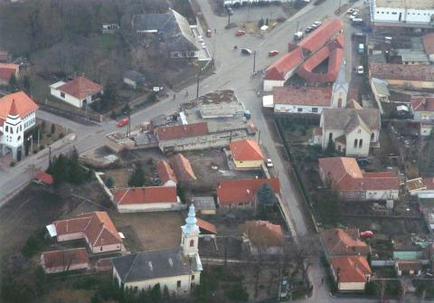 Tápiószele, Hungary, aerialphotgraphy